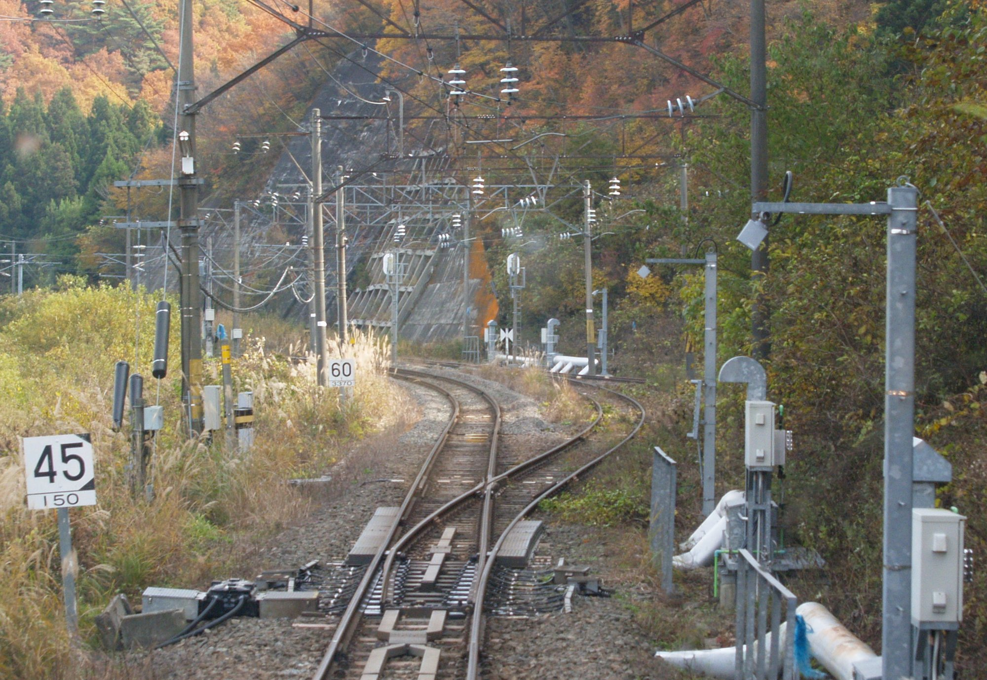 沼上信号場（上戸寄りのポイント。郡山行列車の先頭から撮影）